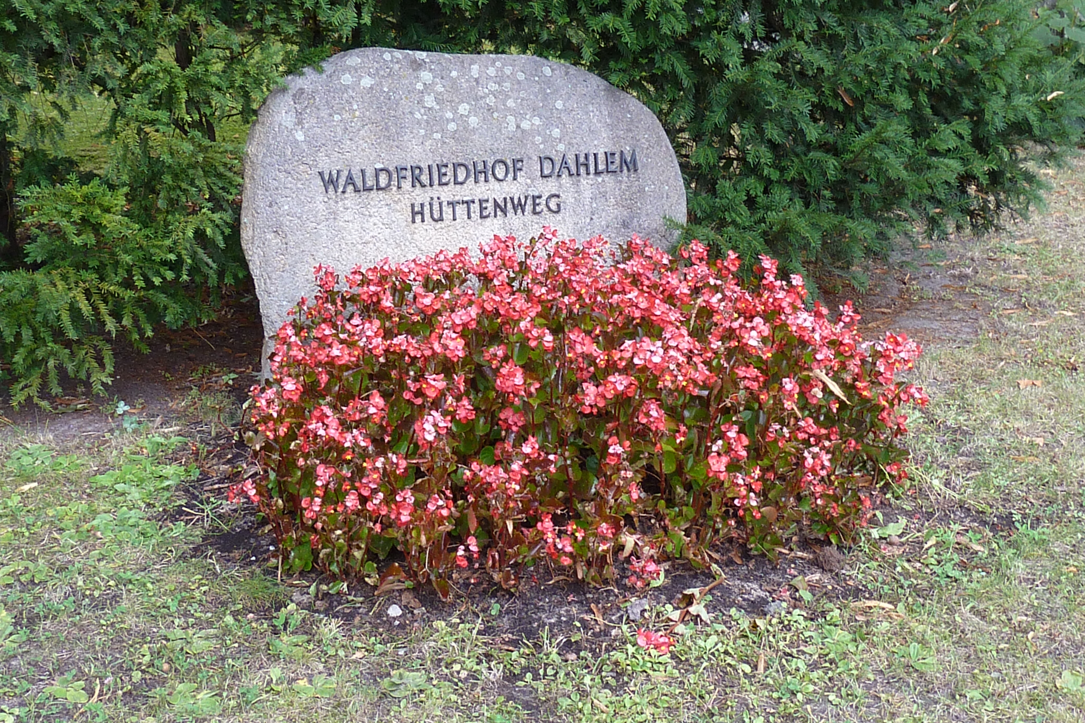 Waldfriedhof Dahlem, Eingang